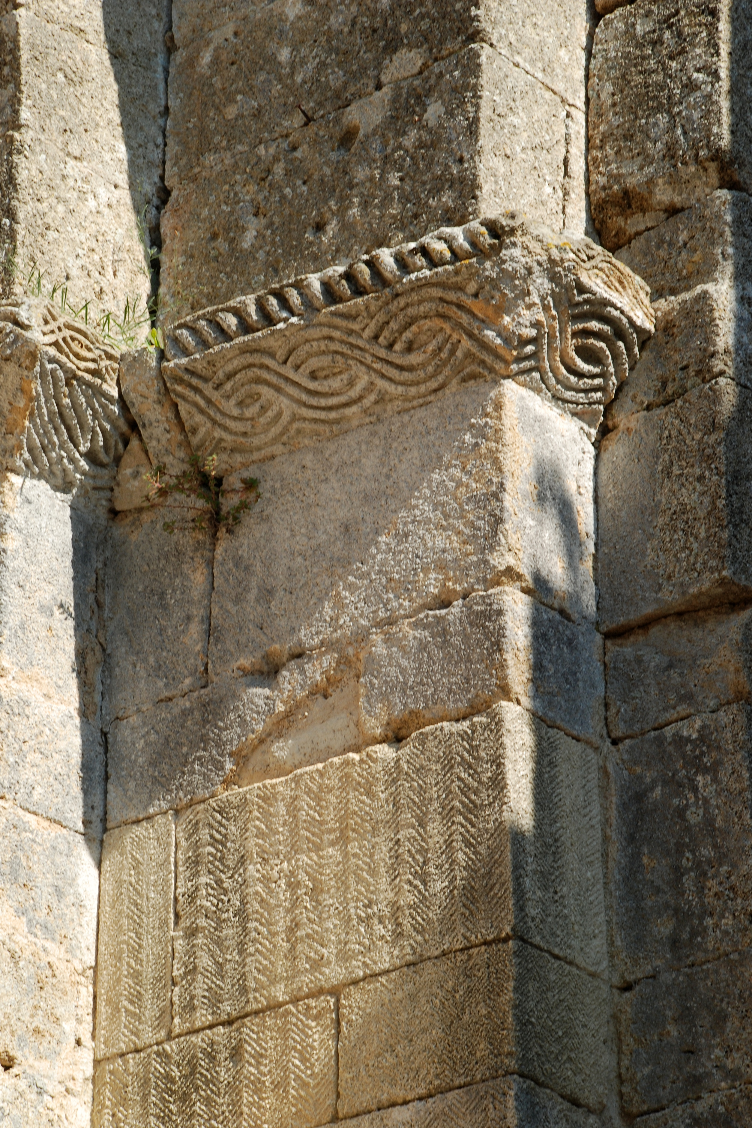 France - Gard - Église Saint-André de Souvignargues